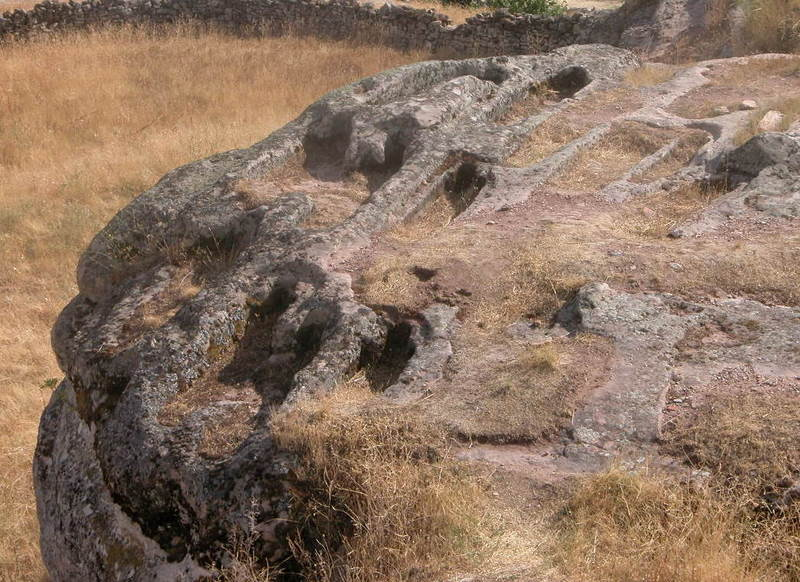 Tumbas antropomorfas, Miño de Medinaceli, Soria, Spain